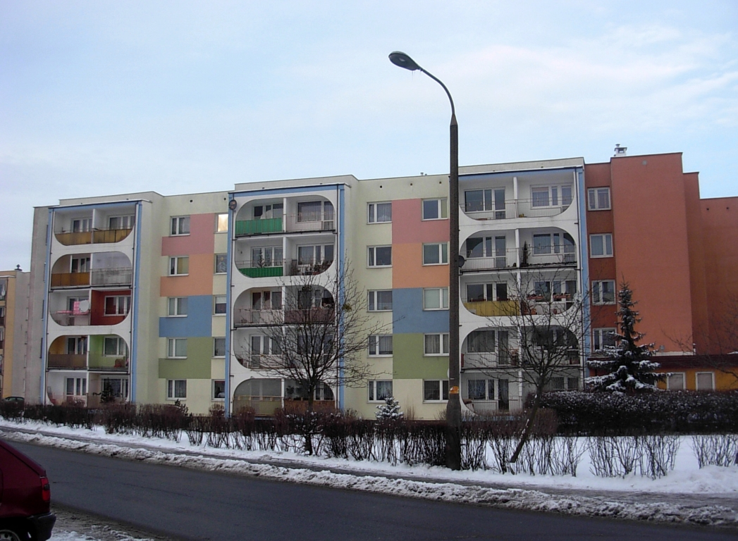 Zabudowa na osiedlu Kapuściska w Bydgoszczy